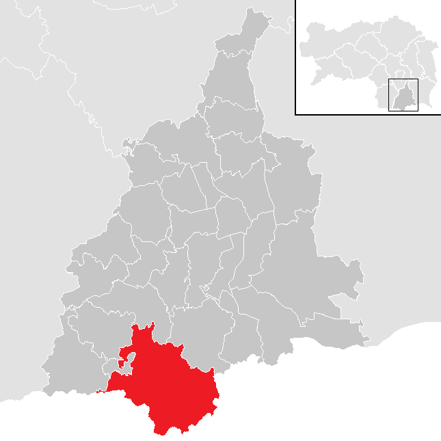 Lage von Leutschach an der Weinstraße im Bezirk Leibnitz